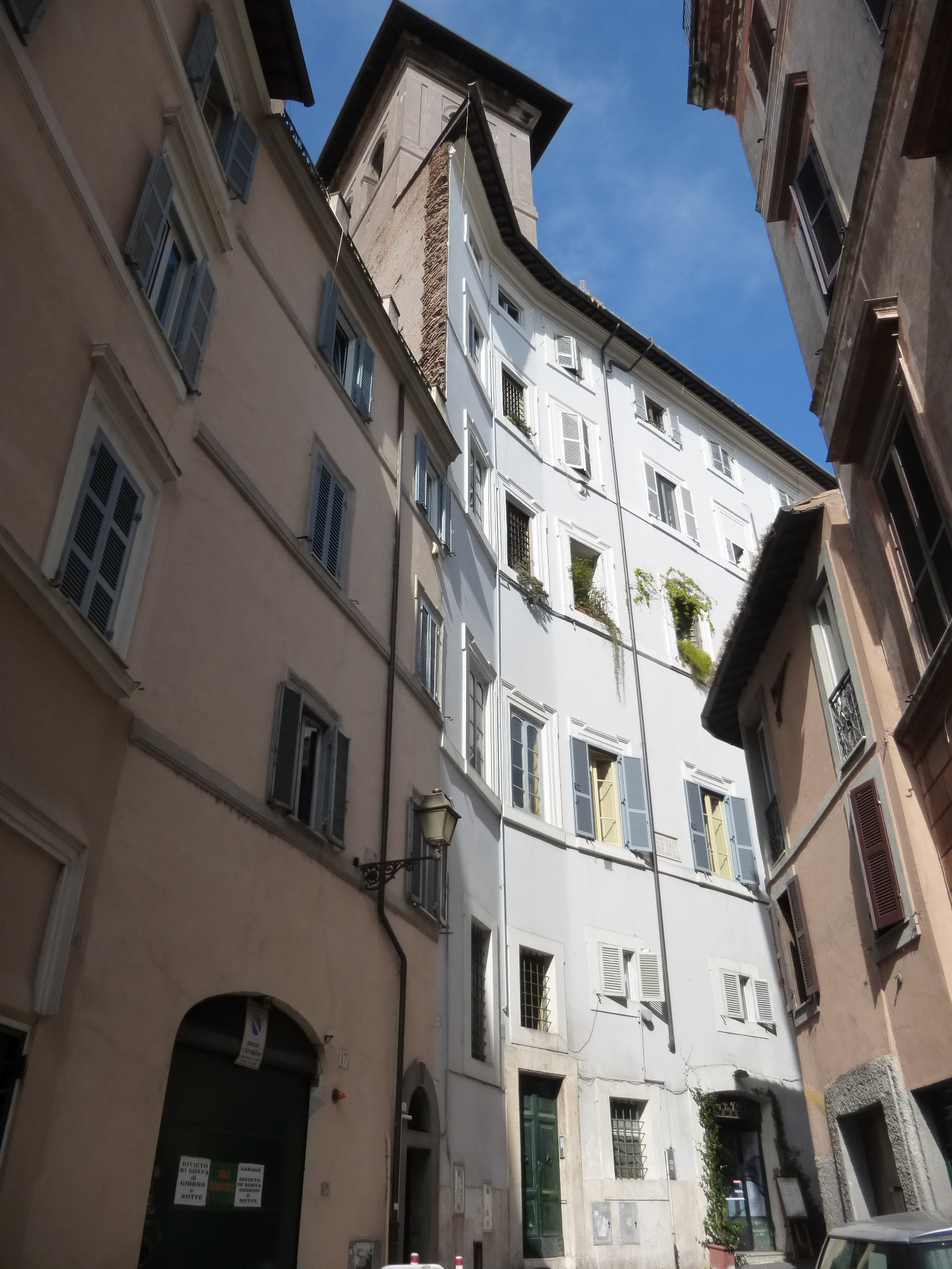 Roma, via della Vetrina. Palazzo Tanari (XVII sec.) poi appartenuto a Luigi Rossini